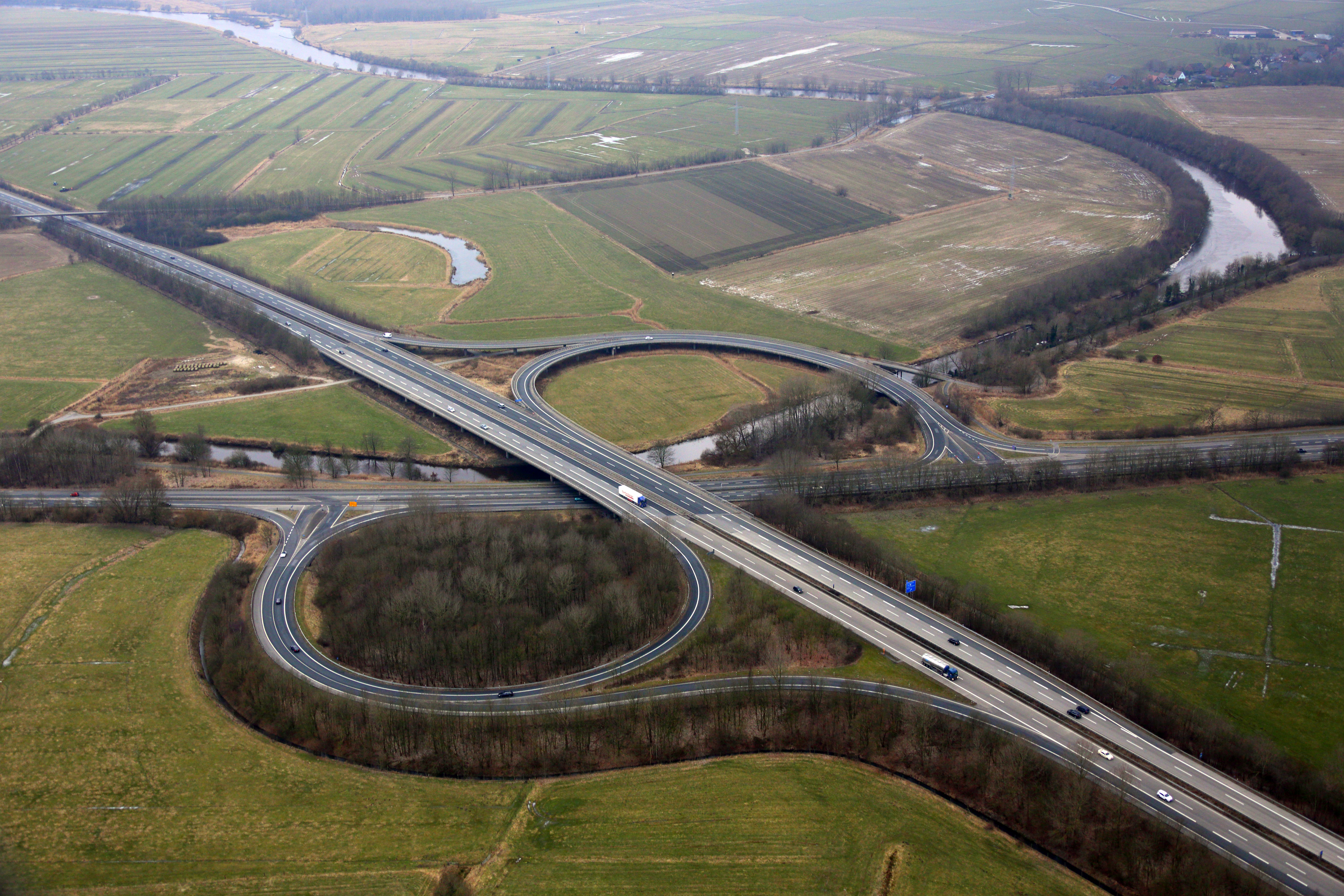 Kreuz Bremerhaven Süd, Autobahnkreuz A27/E234 und der Landstraße B6/L135